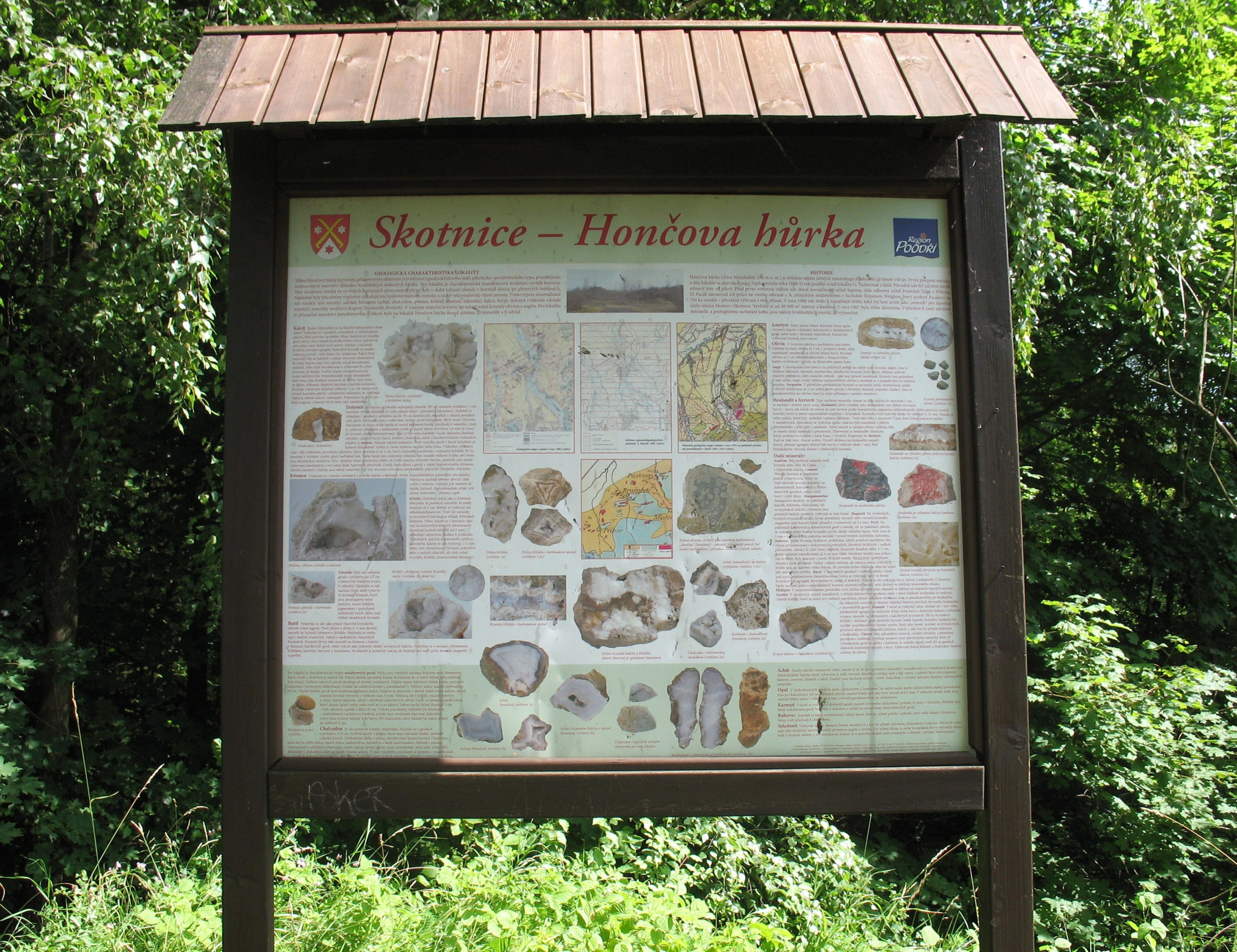 Informační tabule, která byla v bývalém lomu do roku 2014